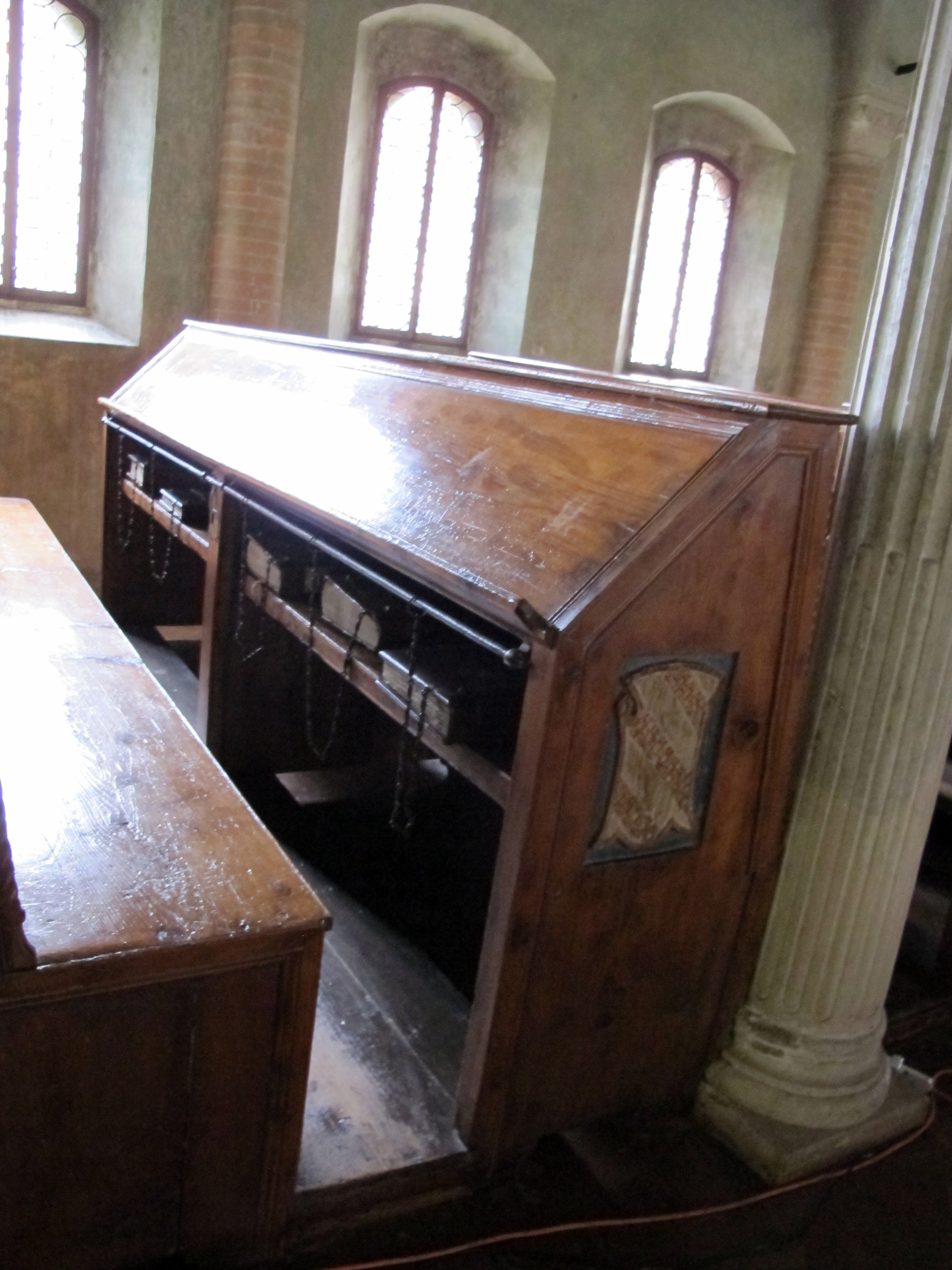 Biblioteca Malatestiana - MIBAC This is a photo of a monument which is part of cultural heritage of Italy.